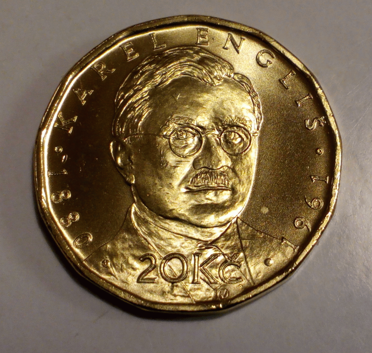 Návrh rubové strany 20 Kč mince provedl na popud České národní banky (ČNB) v roce 2018 autor obíhajících dvacetikorun akademický sochař Vladimír Oppl. Sádrový odlitek rubové strany 20 Kč mince vzor 2019 posoudila kladně „Komise pro posuzování návrhů na české peníze“ na svém jednání dne 9. května 2018 a doporučila jej k realizaci. Bankovní rada České národní banky na svém jednání dne 24. května 2018 potvrdila rozhodnutí komise a schválila realizaci této 20 Kč mince vzor 2019.